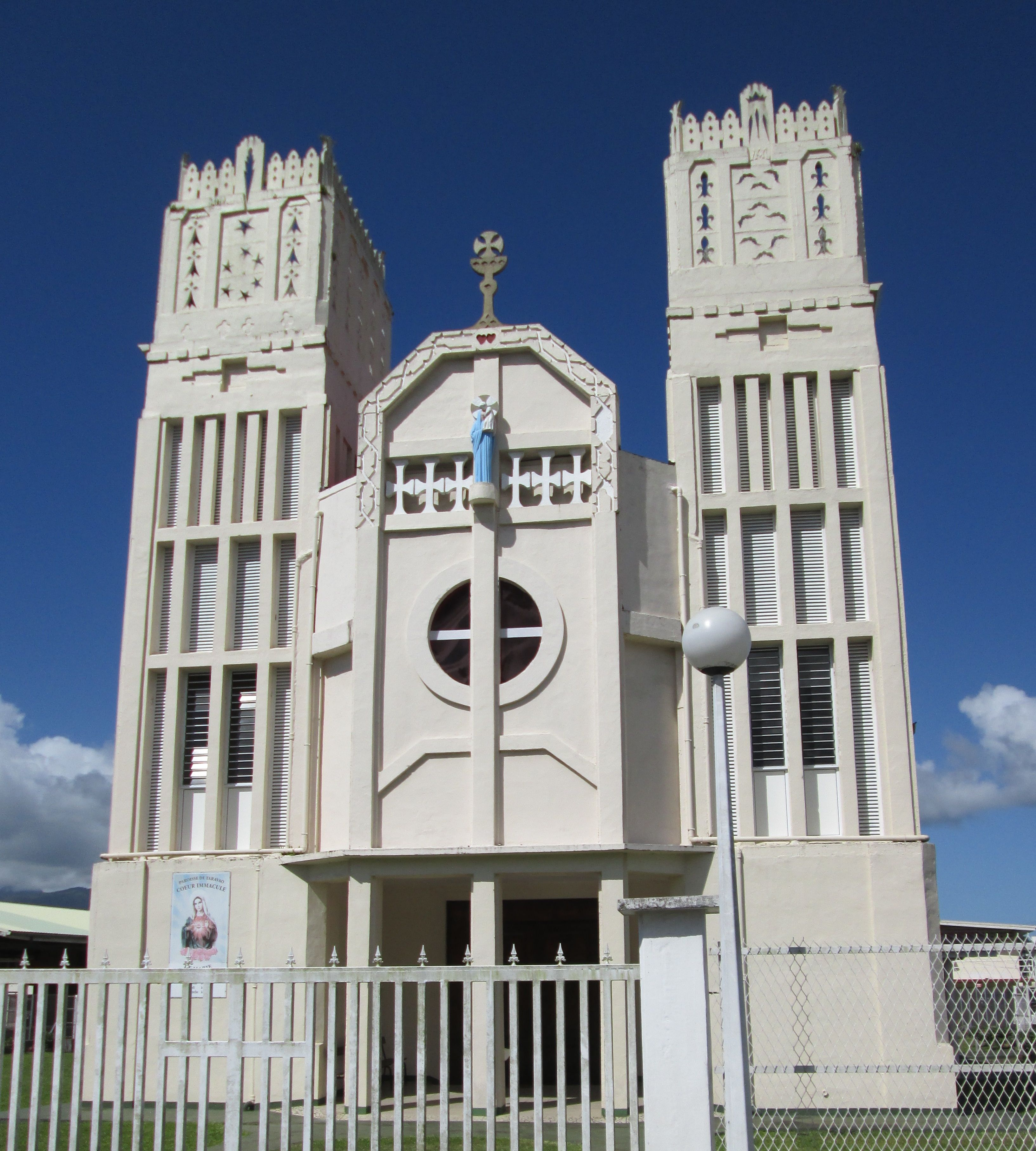 Eglise du Sacré-Coeur de Taravao